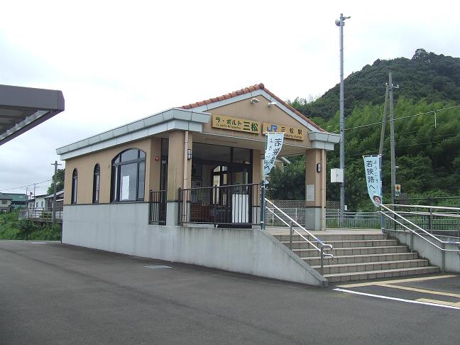 JR三松駅駅舎